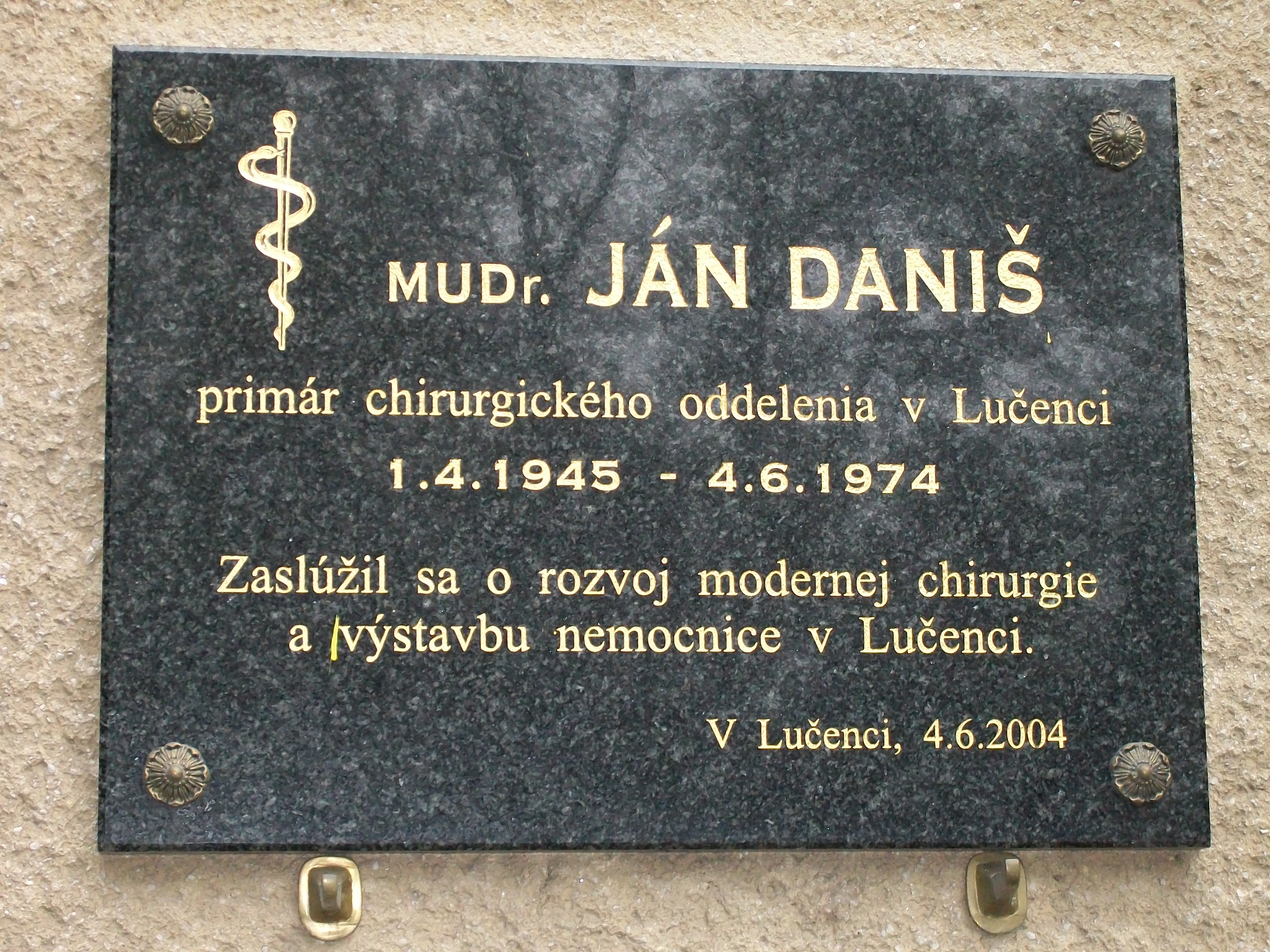 Pamätná tabuľa Mudr. Jána Daniša, primára chirurgického oddelenia v Lučenci (1945 - 1974)